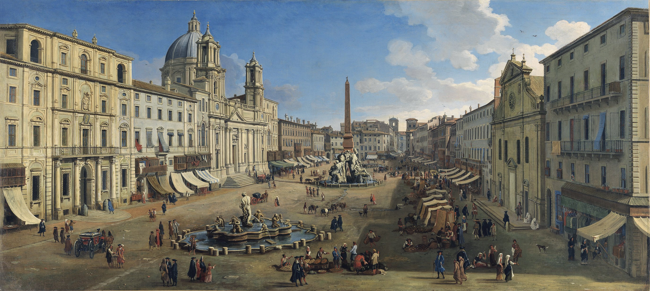 Piazza Navona, Romelabel QS:Les,"Piazza Navona, Roma" label QS:Len,"Piazza Navona, Rome"